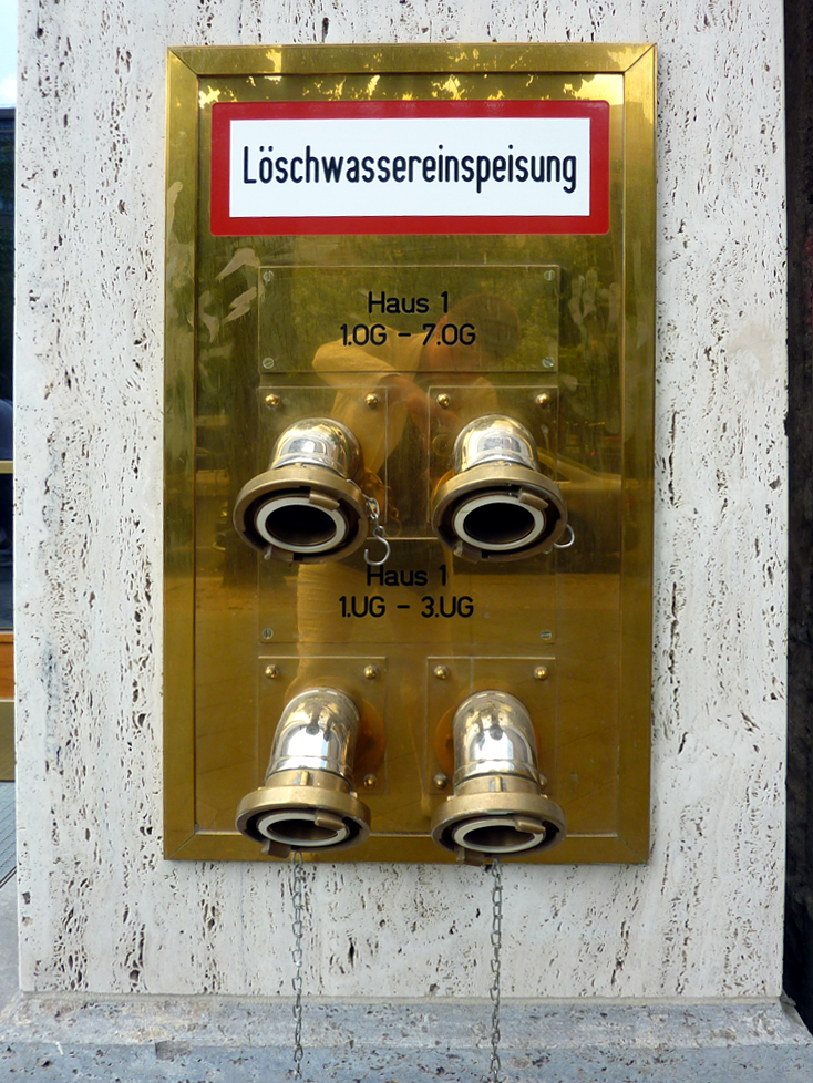 Eine Armatur zur Löschwassereinspeisung für die Feuerwehr, Berlin, Unter den Linden